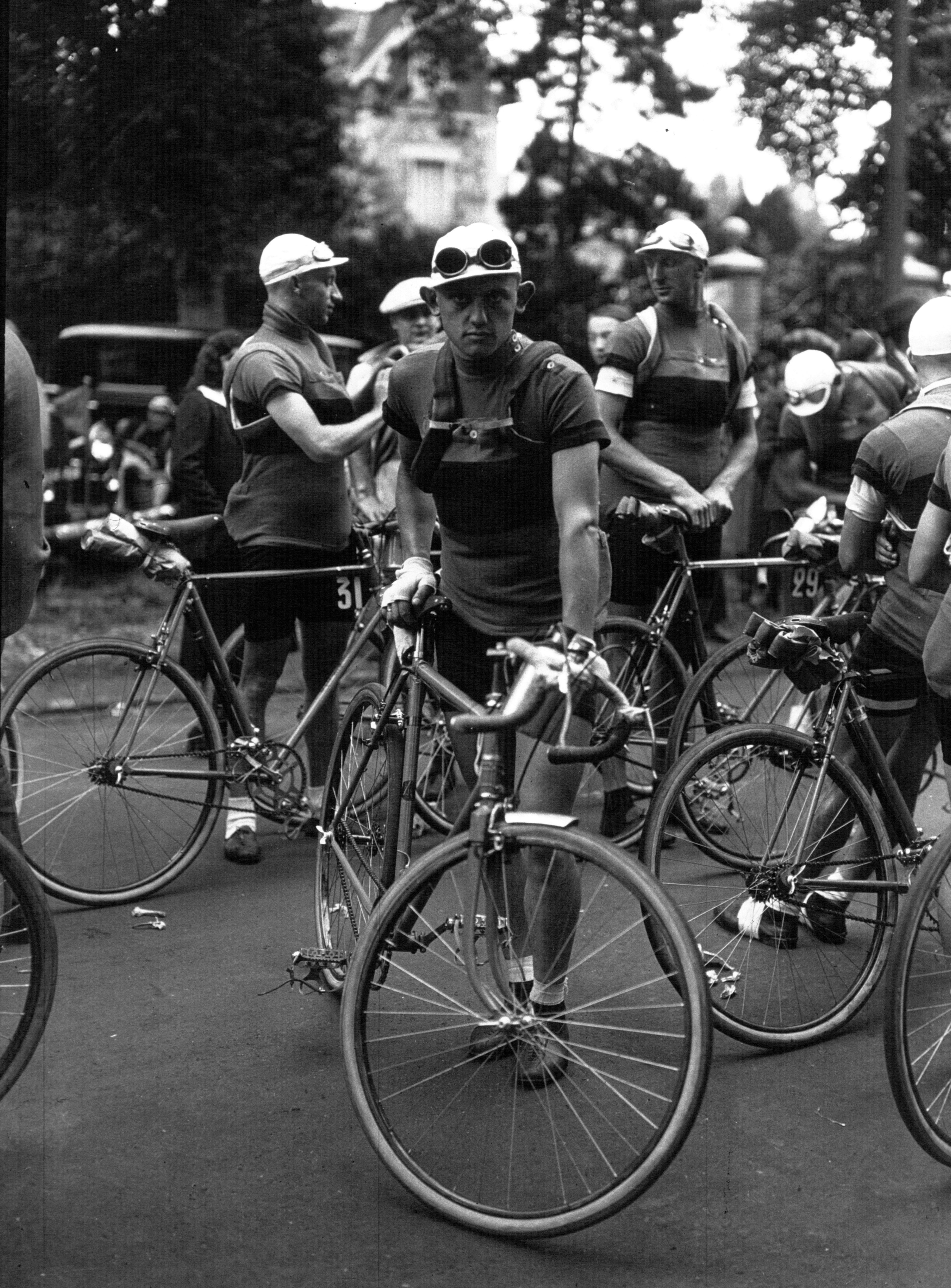 Max Bulla lors du Tour de France 1932